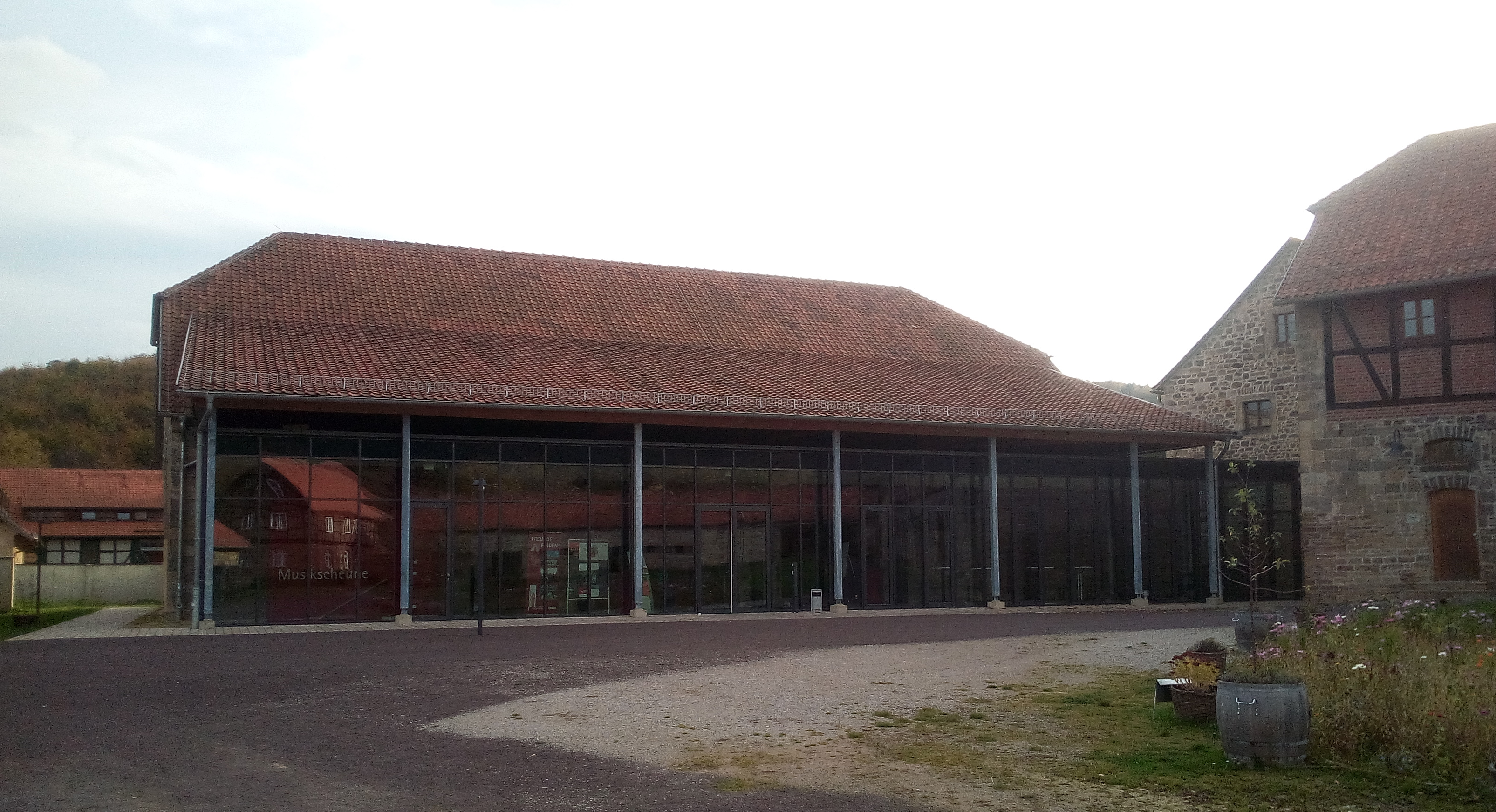 Foto der Musikscheune des Klosters Michaelstein in Blankenburg 2017